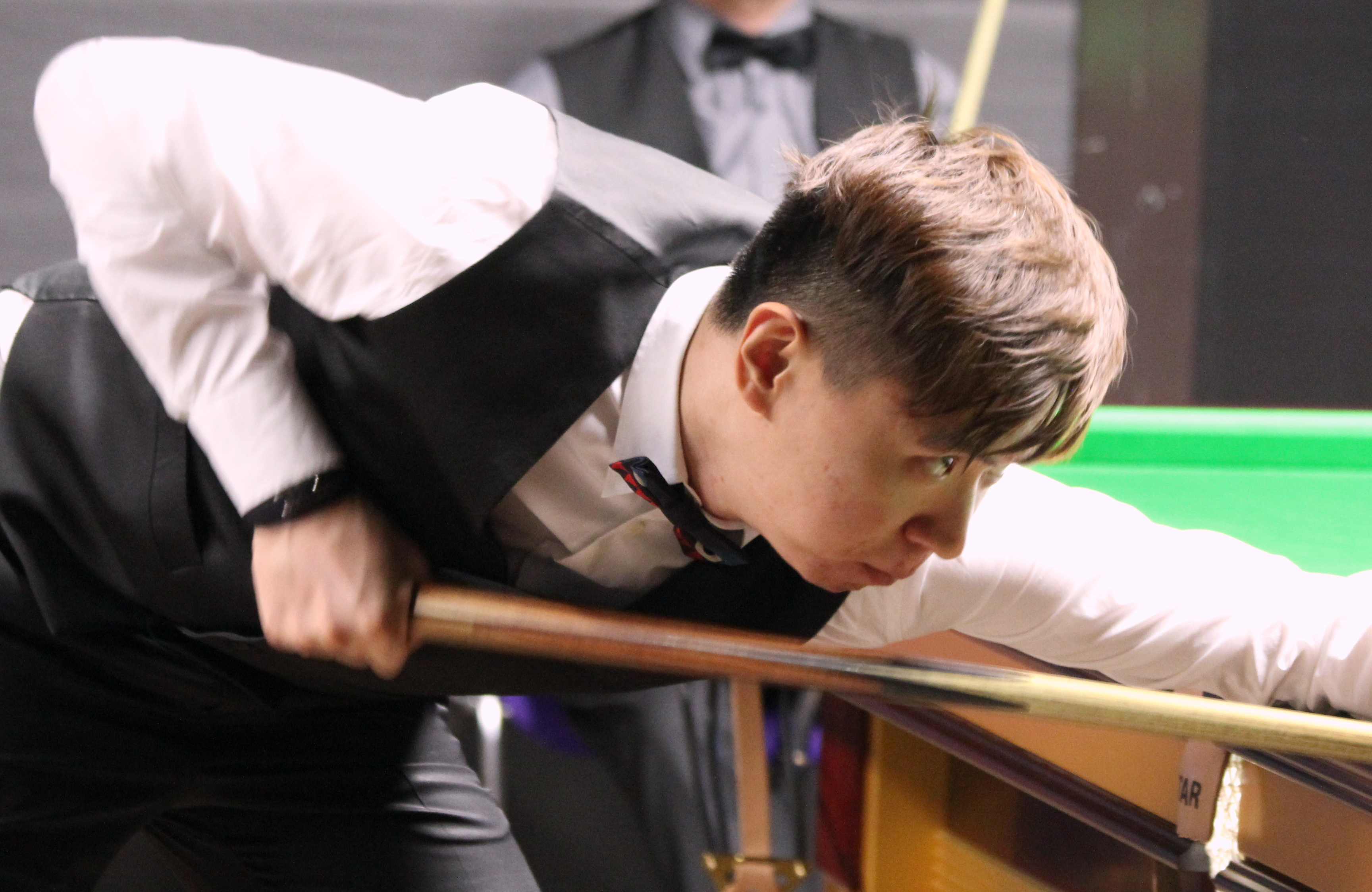 Xiao Guodong beim Paul Hunter Classic 2016